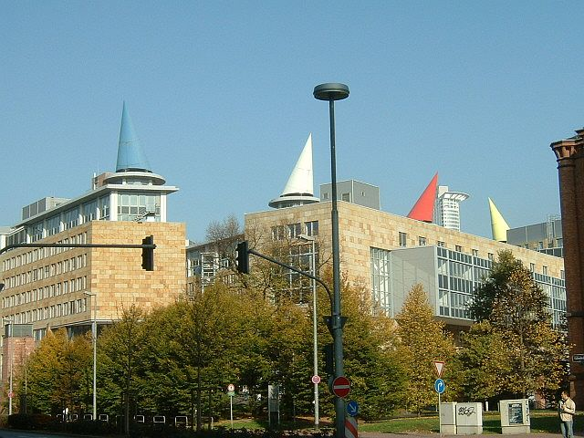 Tax-office in Frankfurt/Main, in Frankfurt-Gutleut. Finanzamt Frankfurt, picture taken on 31. Oktober 2005 Die markanten bunten "Dachhütchen" stammen von der Gruppe Formalhaut der Architekten Gabriela Seifert und Götz G. Stöckmann und dem Künstler Ottmar Hörl.